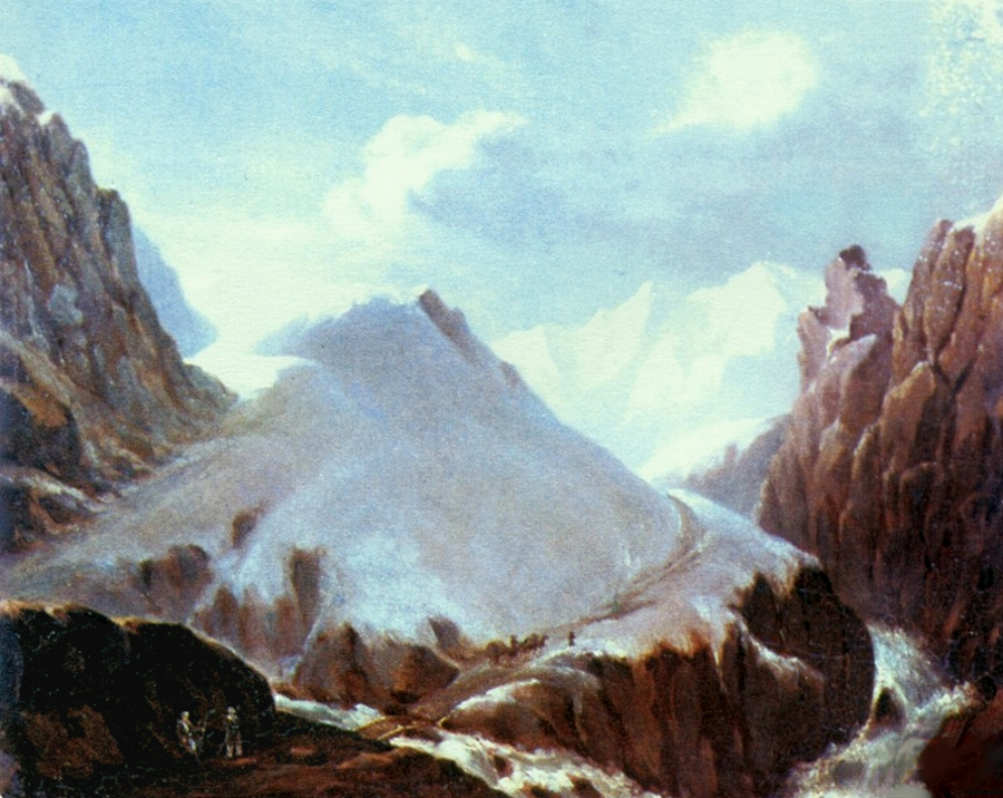 Лермонтов - Крестовый перевал 1837–38 годы